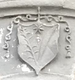 Chiesa di Santa Maria del Soccorso a Caccuri